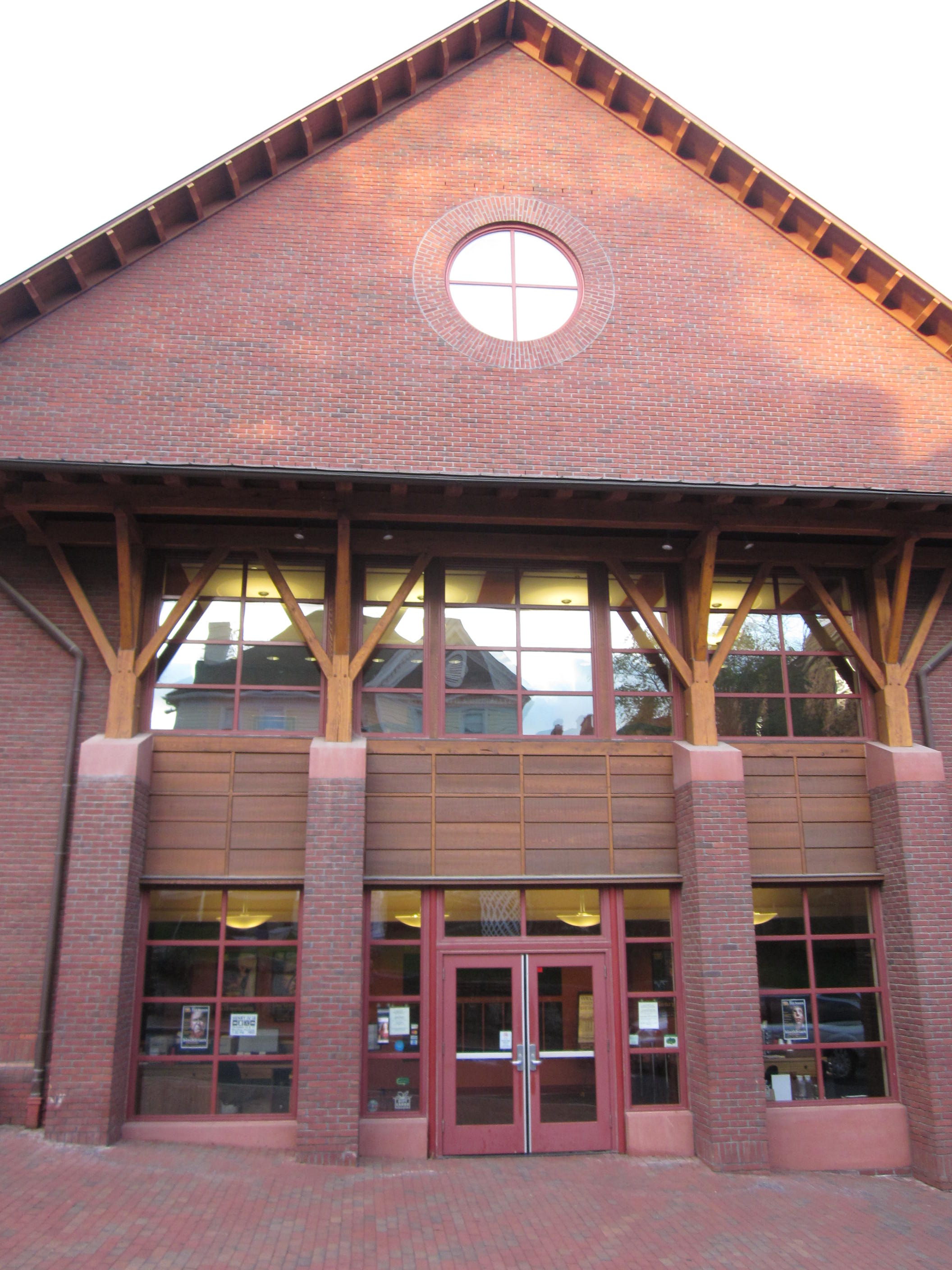 Staunton, Virginia